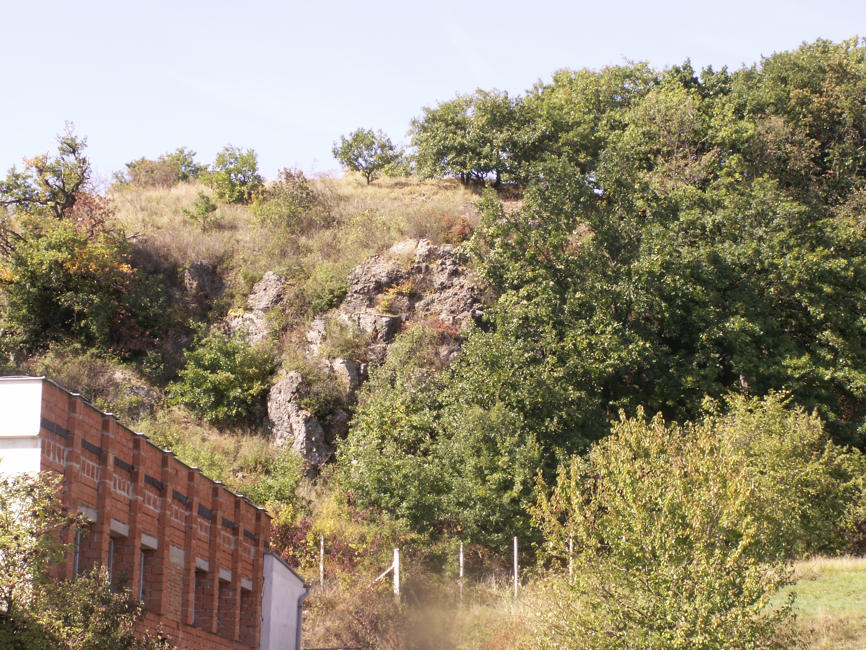 přírodní památka v okrese Brno-venkov